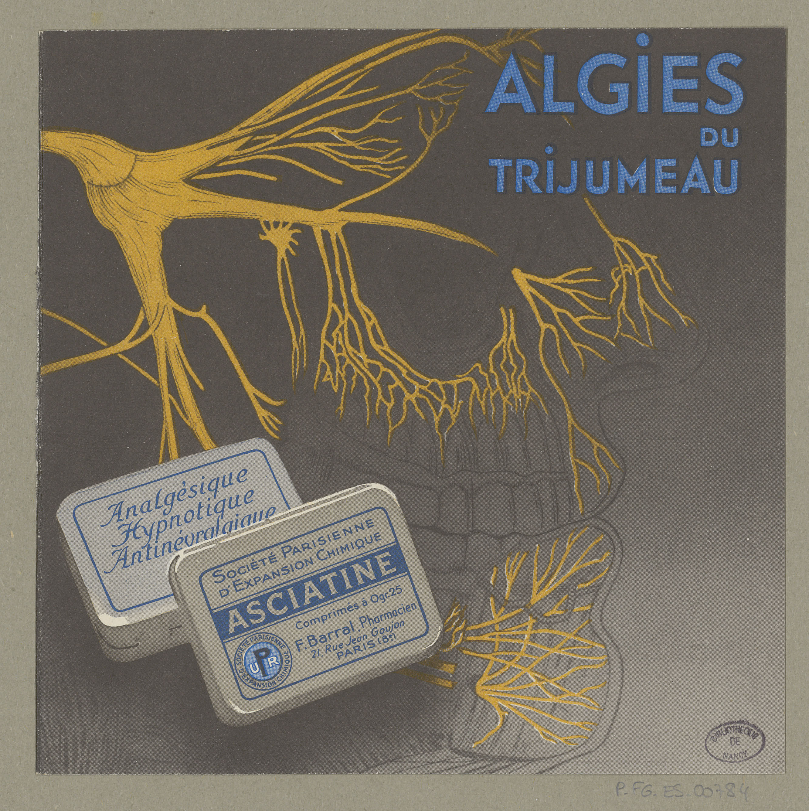 Date incertaine